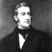 Porträt von Johannes Scharrer